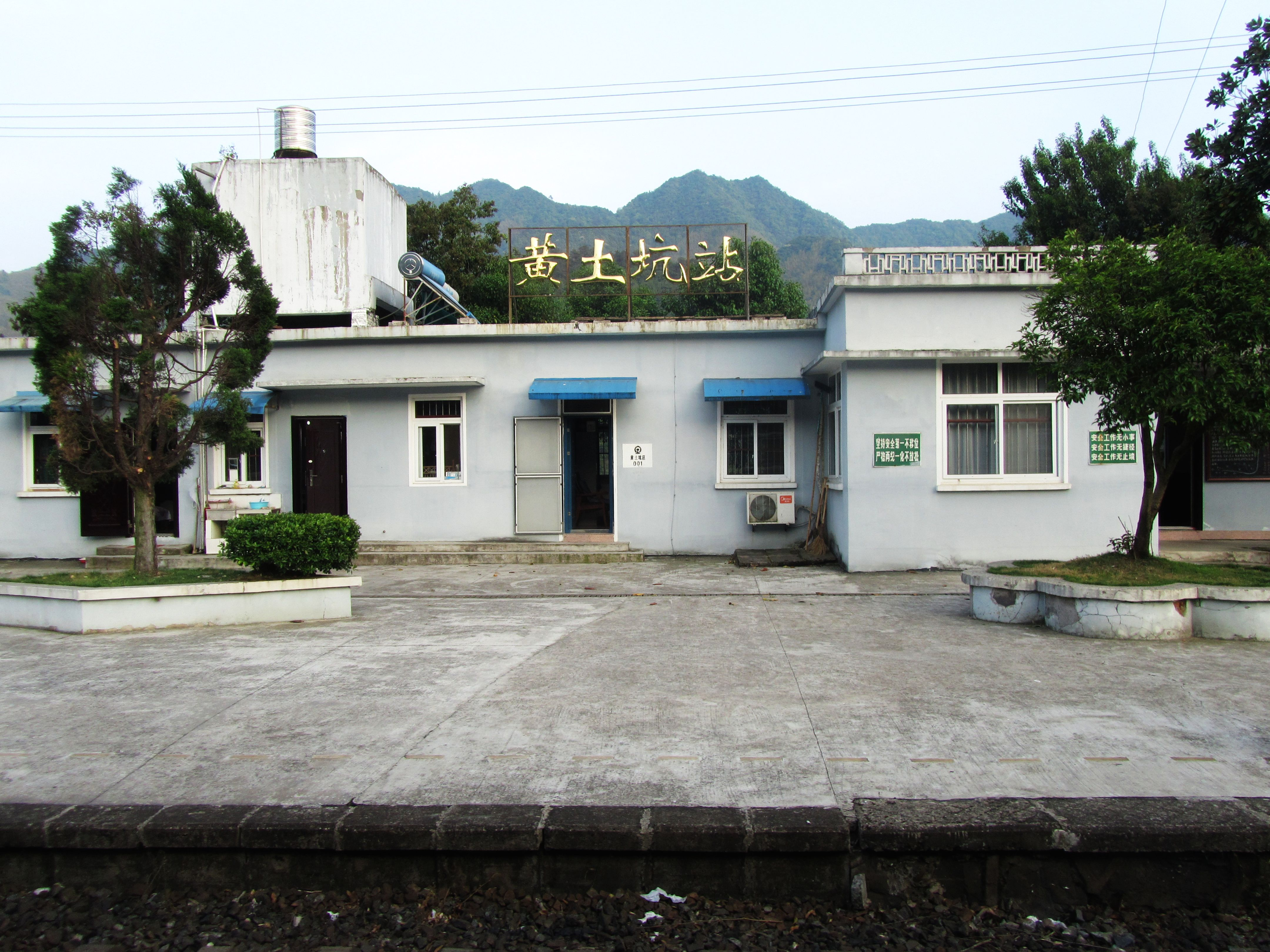 皖赣铁路黄土坑站，位于宣城市绩溪县。